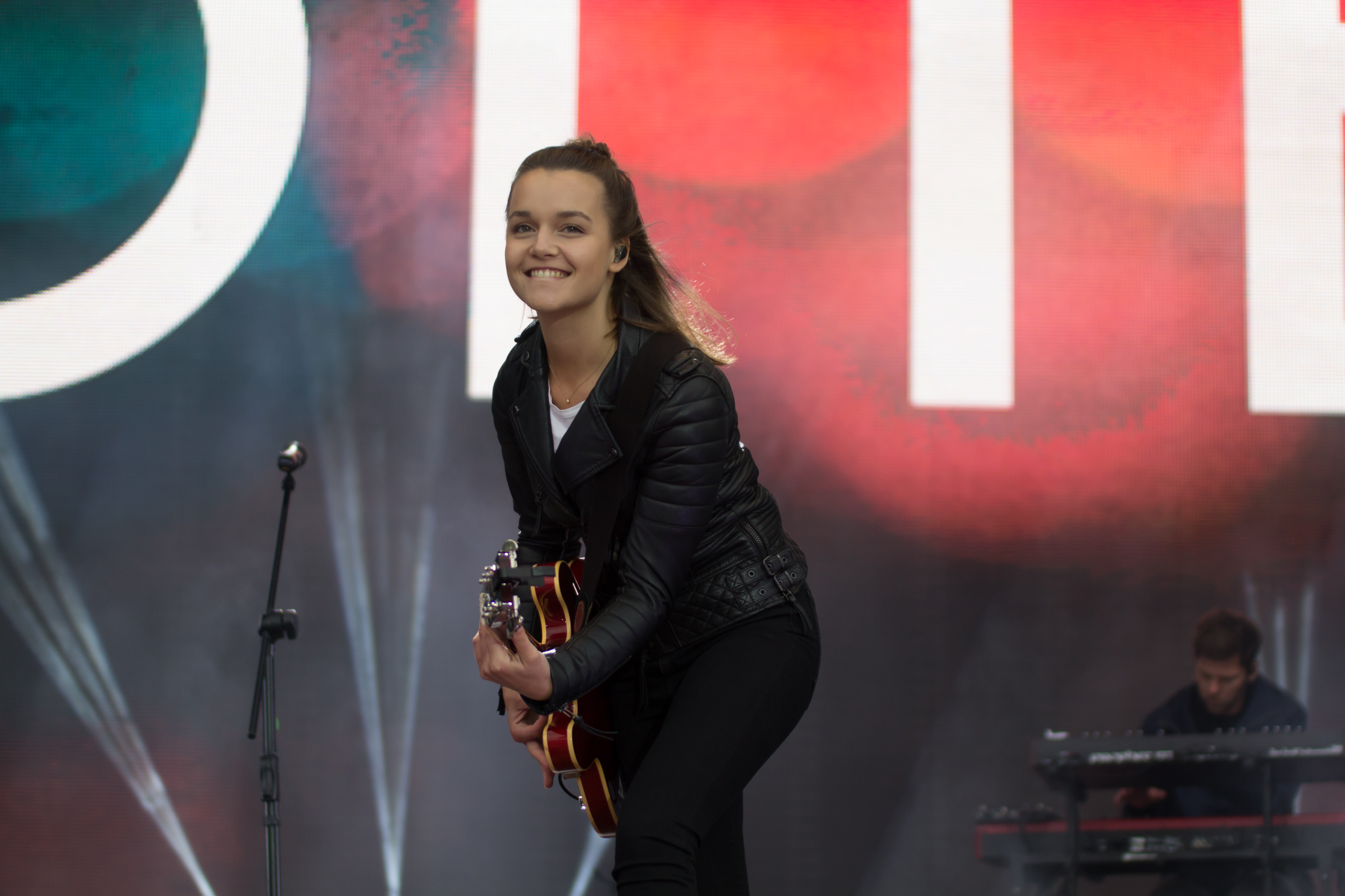 Auf der Kieler Woche 2018